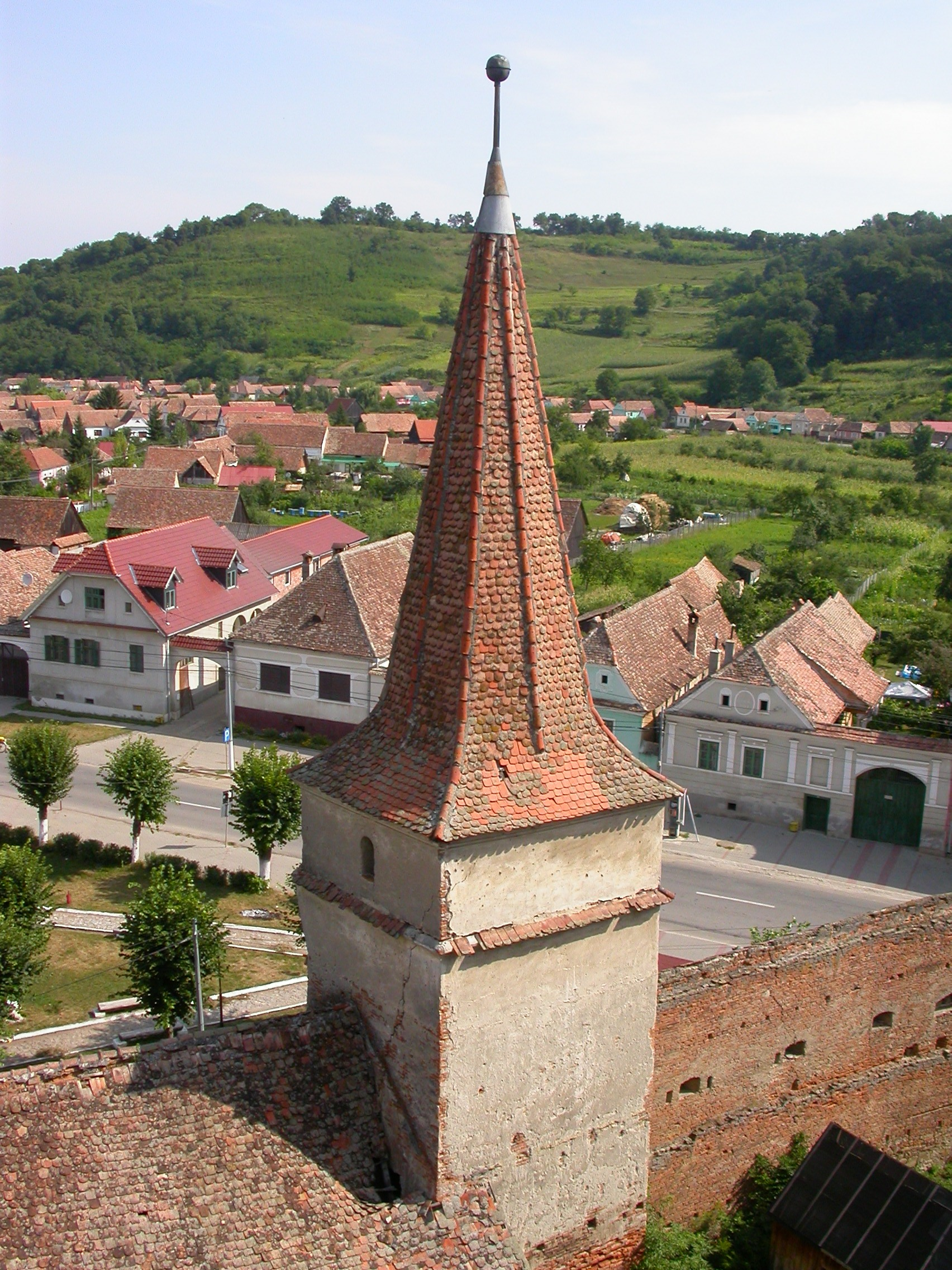 Ansamblul rural "Centrul istoric"